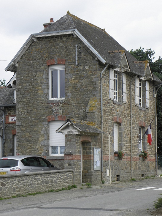 Mairie de Trimer (35).